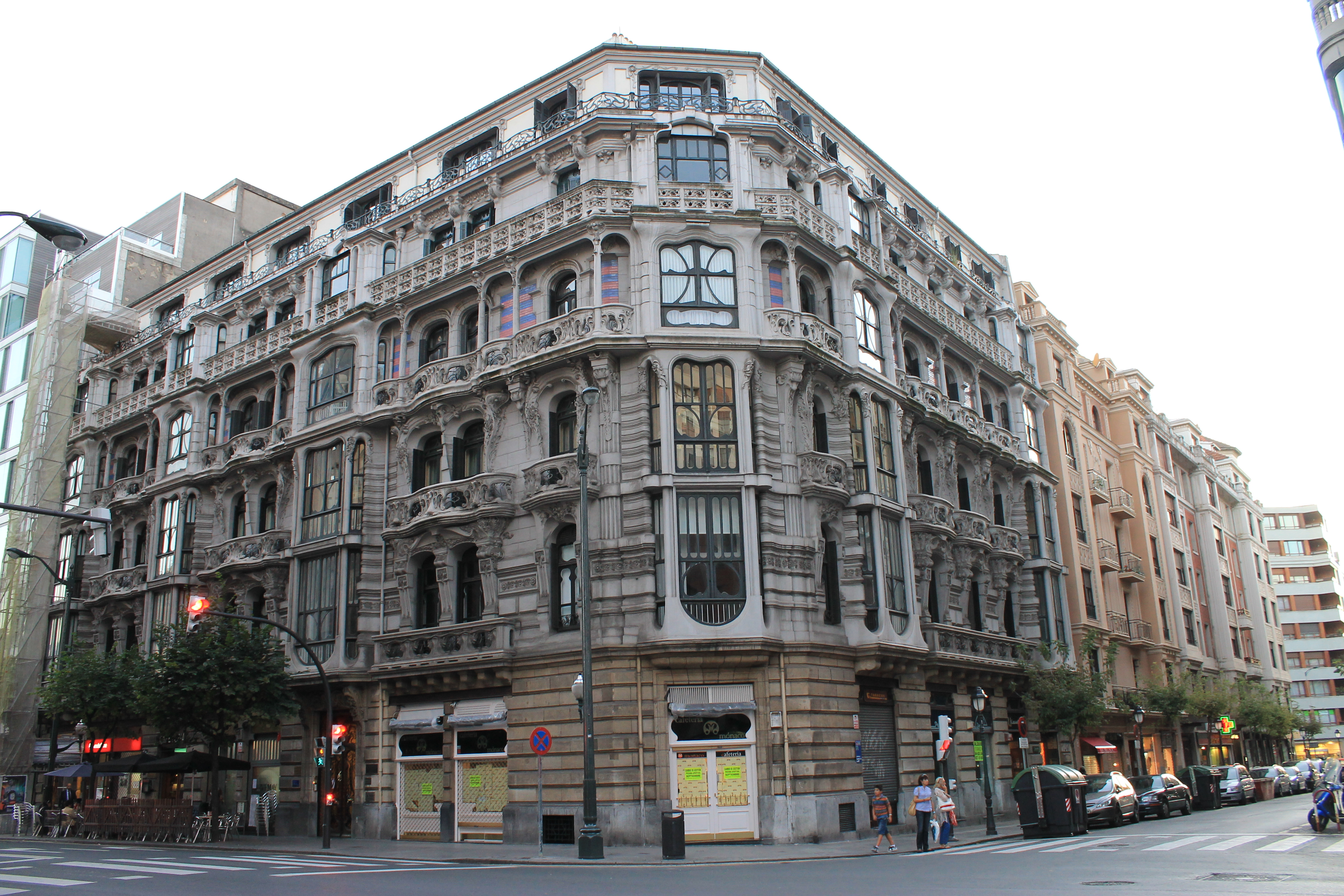 Casa Montero en Bilbao, esquina de la Calle Colón de Larreátegui y la Alameda Recalde.